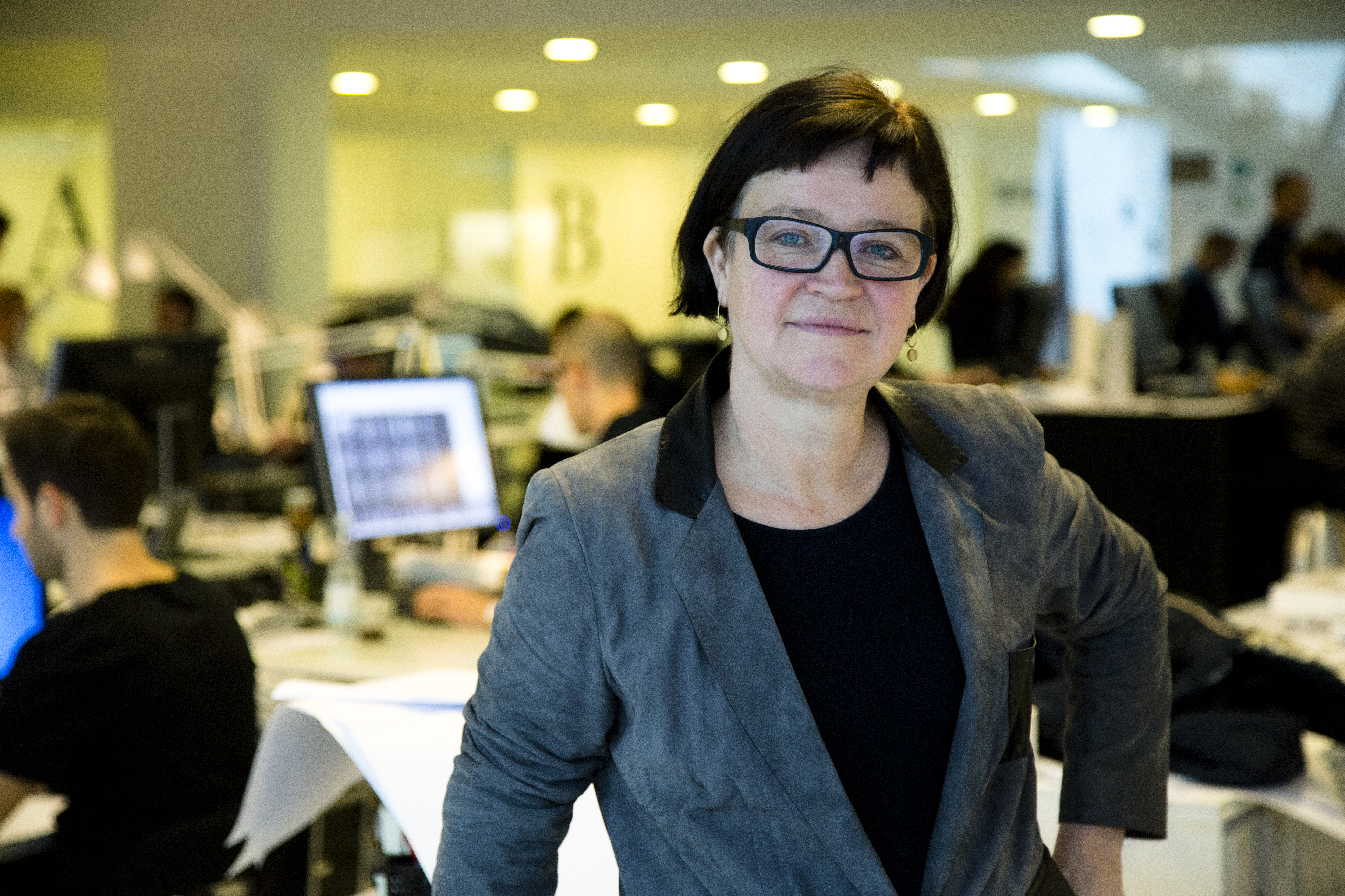 Mette Kynne Frandsen, adm. direktør Henning Larsen Arhictects, kontoret i København på Vesterbrogade 76, 2012-11-20. Foto: News Øresund – Jenny Andersson © News Øresund.Bilden får fritt publiceras under förutsättning att källa anges. (The picture can be used freely under the prerequisite that the source is given. ) Set: Arhitecture. Originalfil tillhandahålles gratis, kontakta: News Øresund, Malmö, Sweden. News Øresund är en oberoende regional nyhetsbyrå som ingår i projektet Øresund Media Platform som drivs av Øresundsinstituttet i partnerskap med Lunds universitet och Roskilde Universitet och med delfinansiering från EU (Interreg IV A Öresund) och 15 regionala, icke kommersiella aktörer.